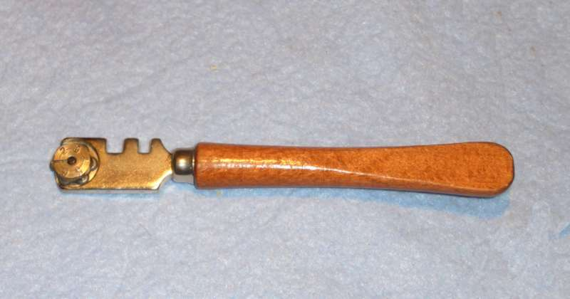 Glasschneider